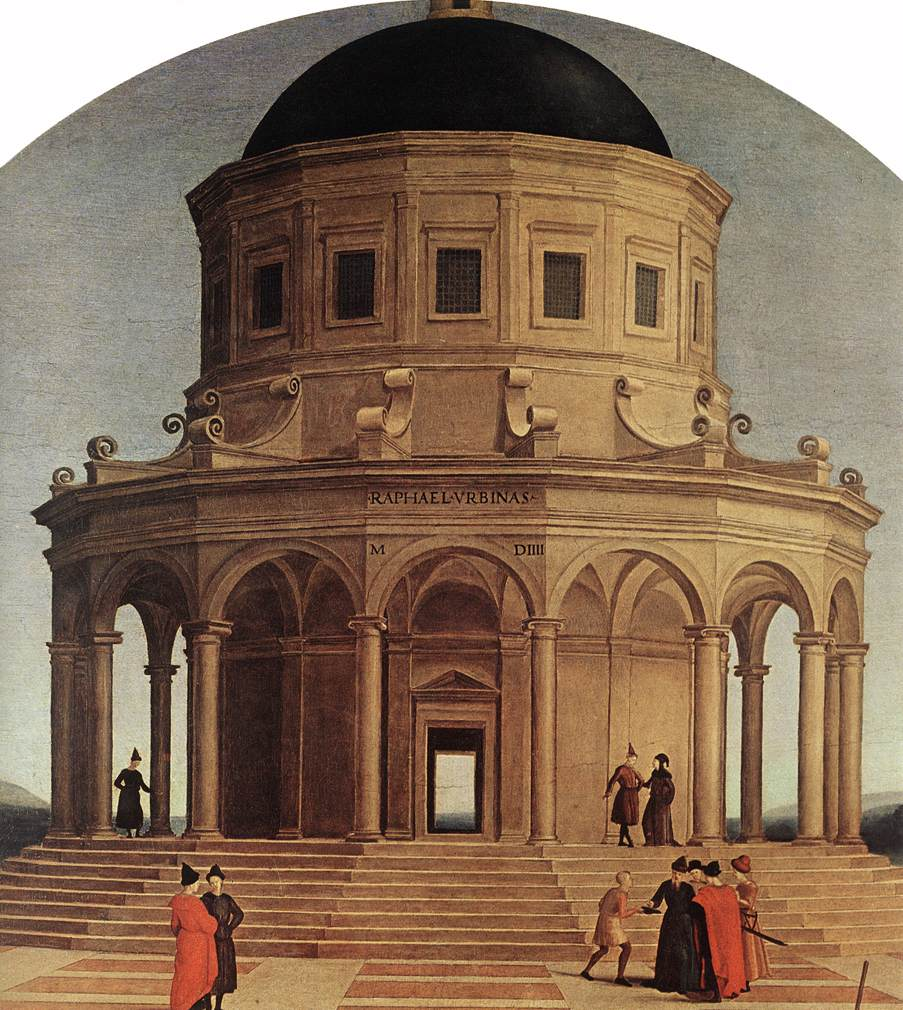 RAFFAELLO Sanzio Spozalizio (detail) Oil on roundheaded panel Pinacoteca di Brera, Milan